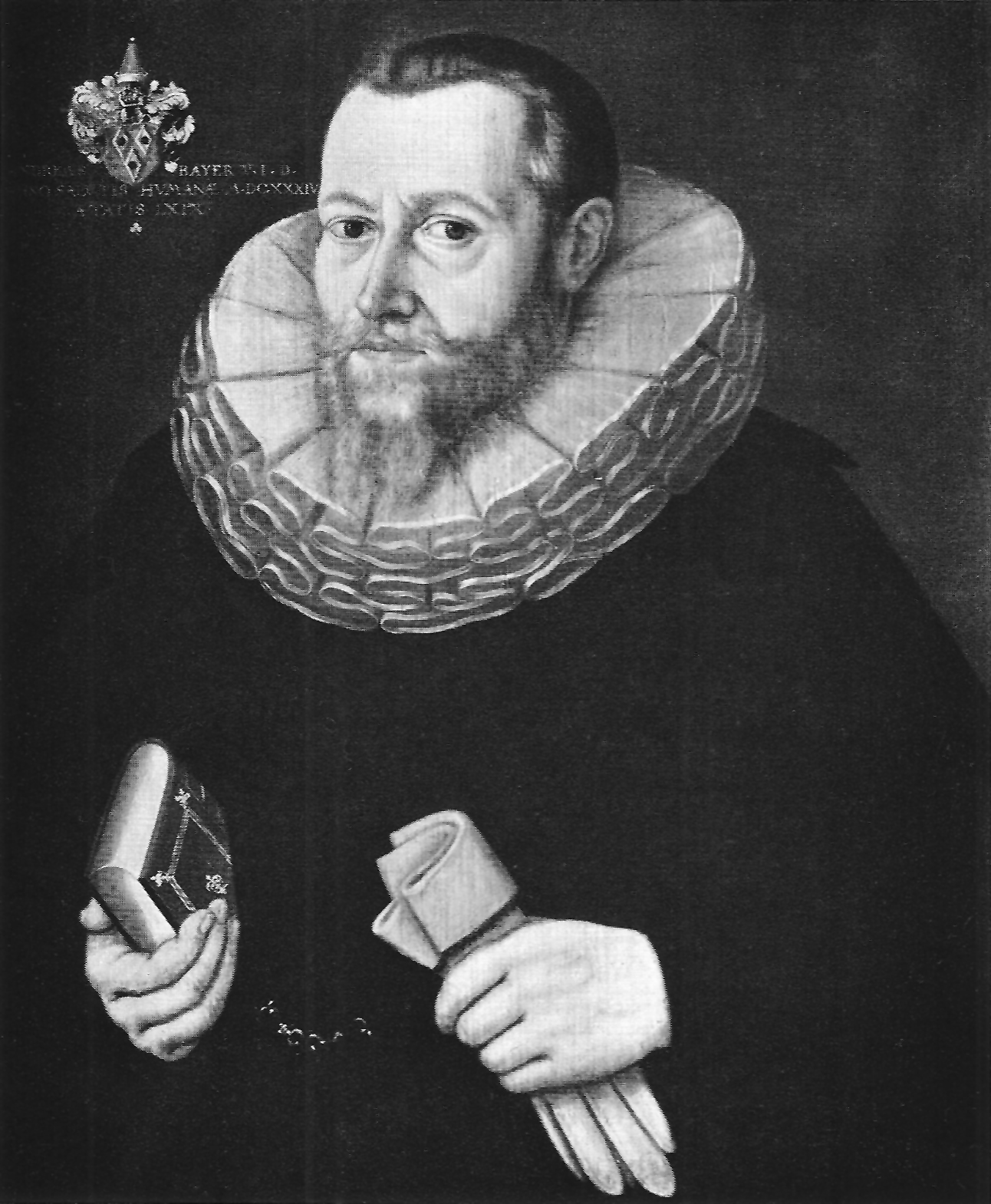 Prof. Andreas Bayer (1566–1635), (Ölbildnis, Tübinger Professorengalerie)